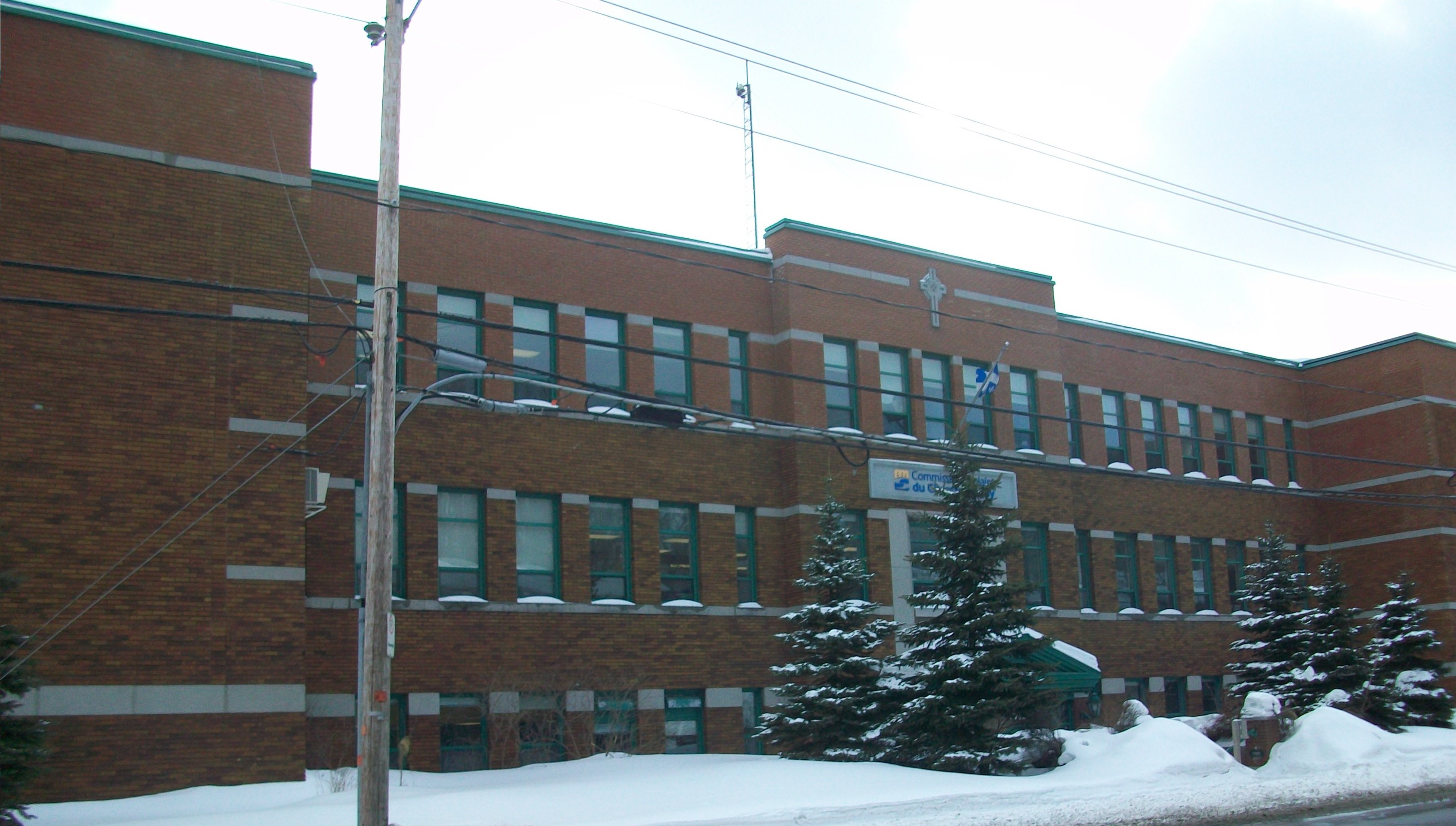 Centre administratif CSCDR